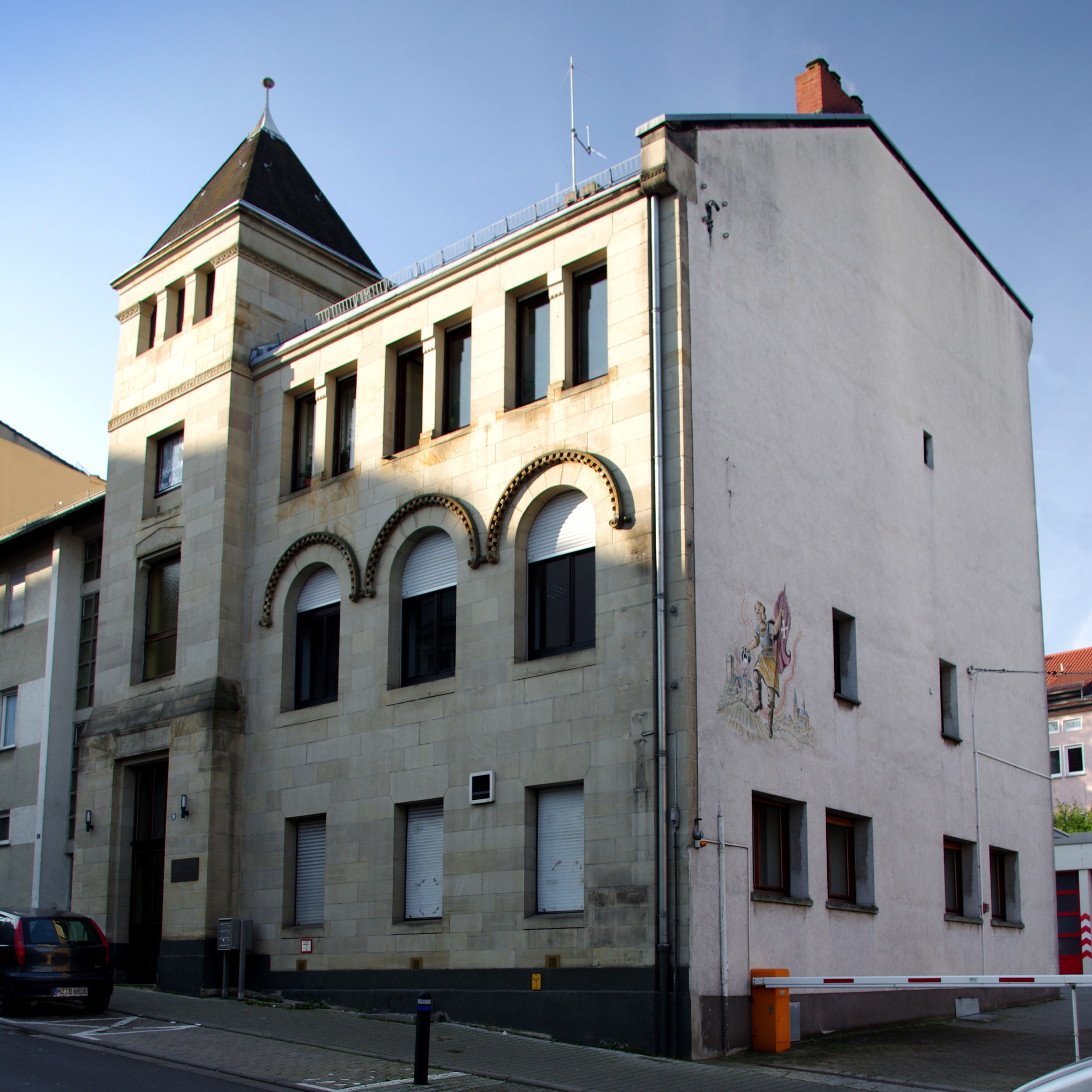 Seitentrakt der "Neuen Synagoge" von 1903/05 in Bingen heute.